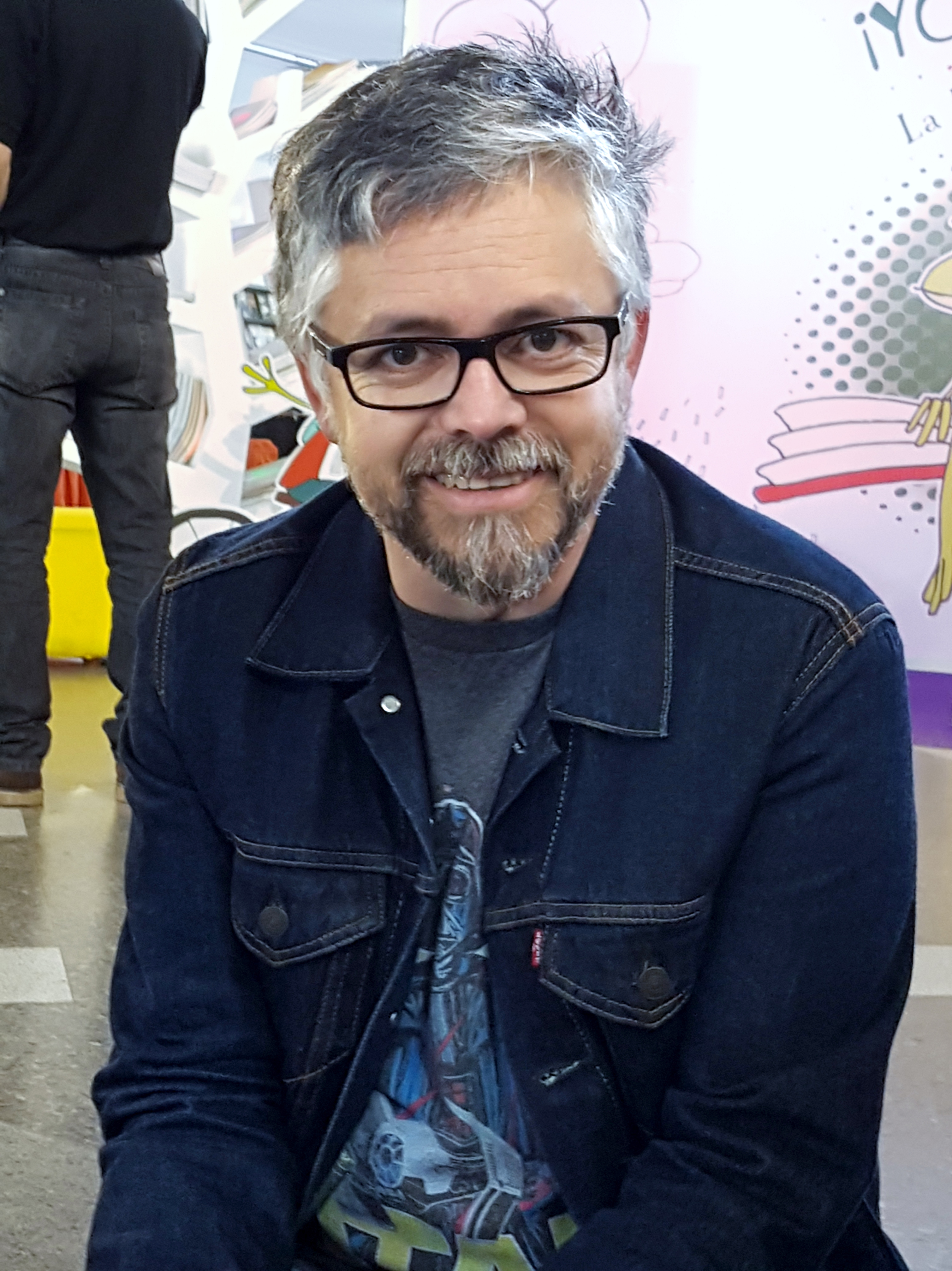 El escritor chileno Jorge Baradit en la Feria Internacional del Libro de Santiago 2017.